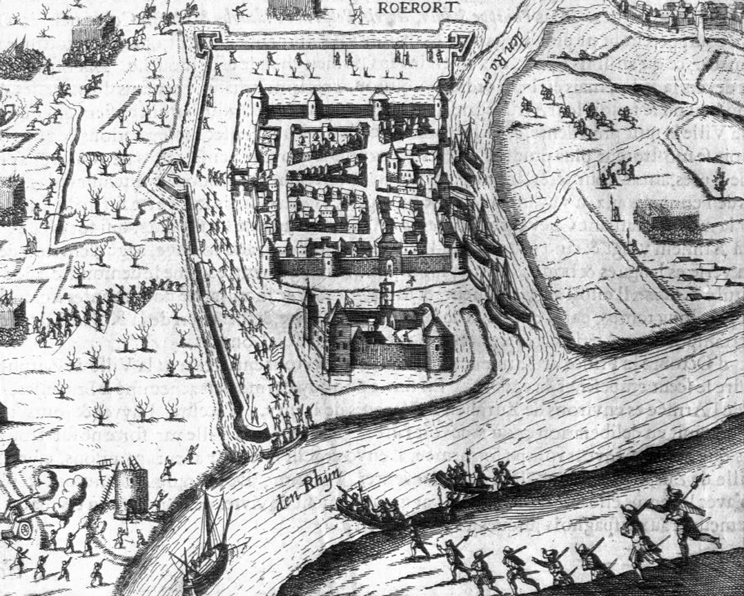 Abbild des Ruhrorter Kasteels (manchmal auch Kastell), Zollstätte und festes Haus, das von 1373 bis 1636 existierte, im Jahr 1587 This is a photograph of an archaeological site.